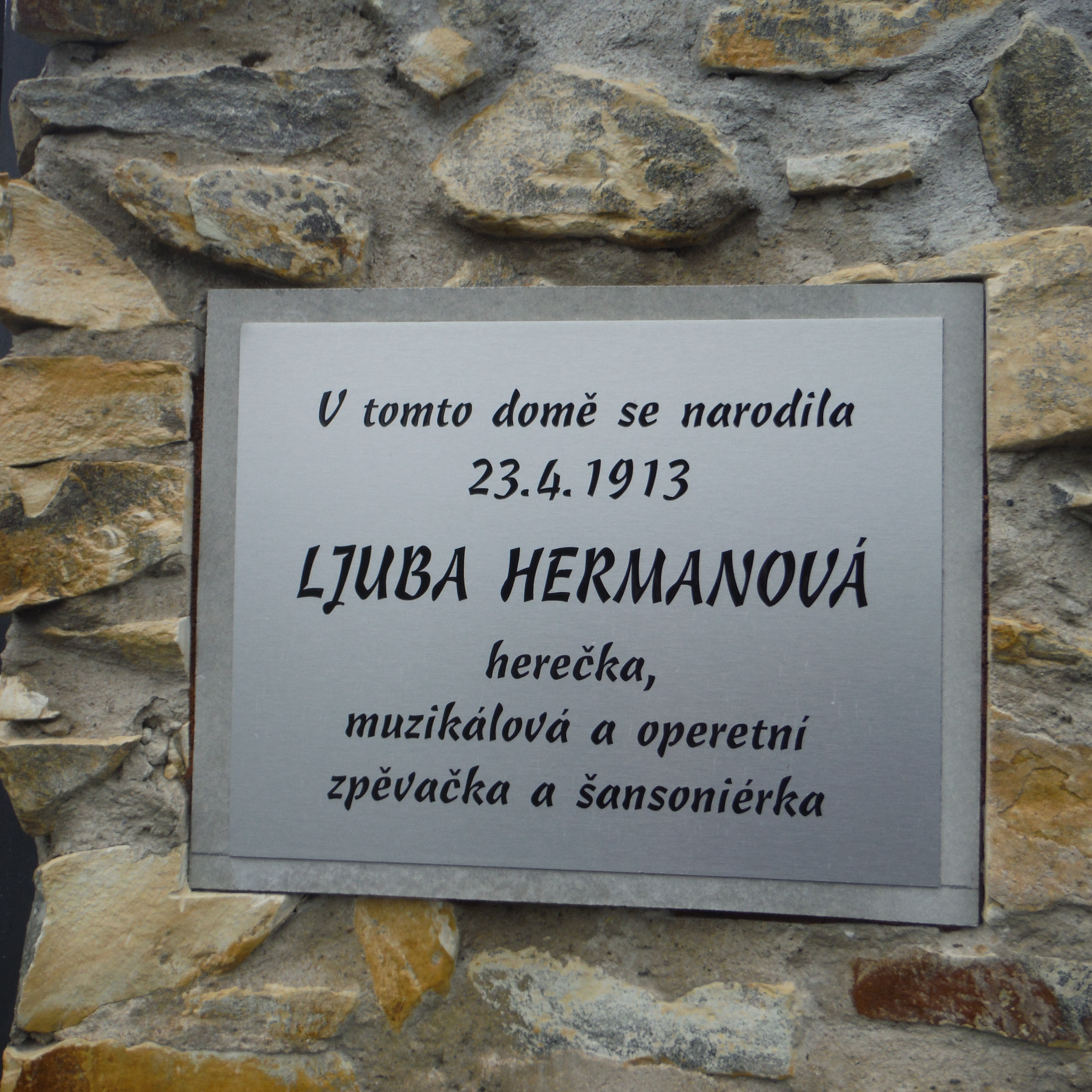 na rodném domě